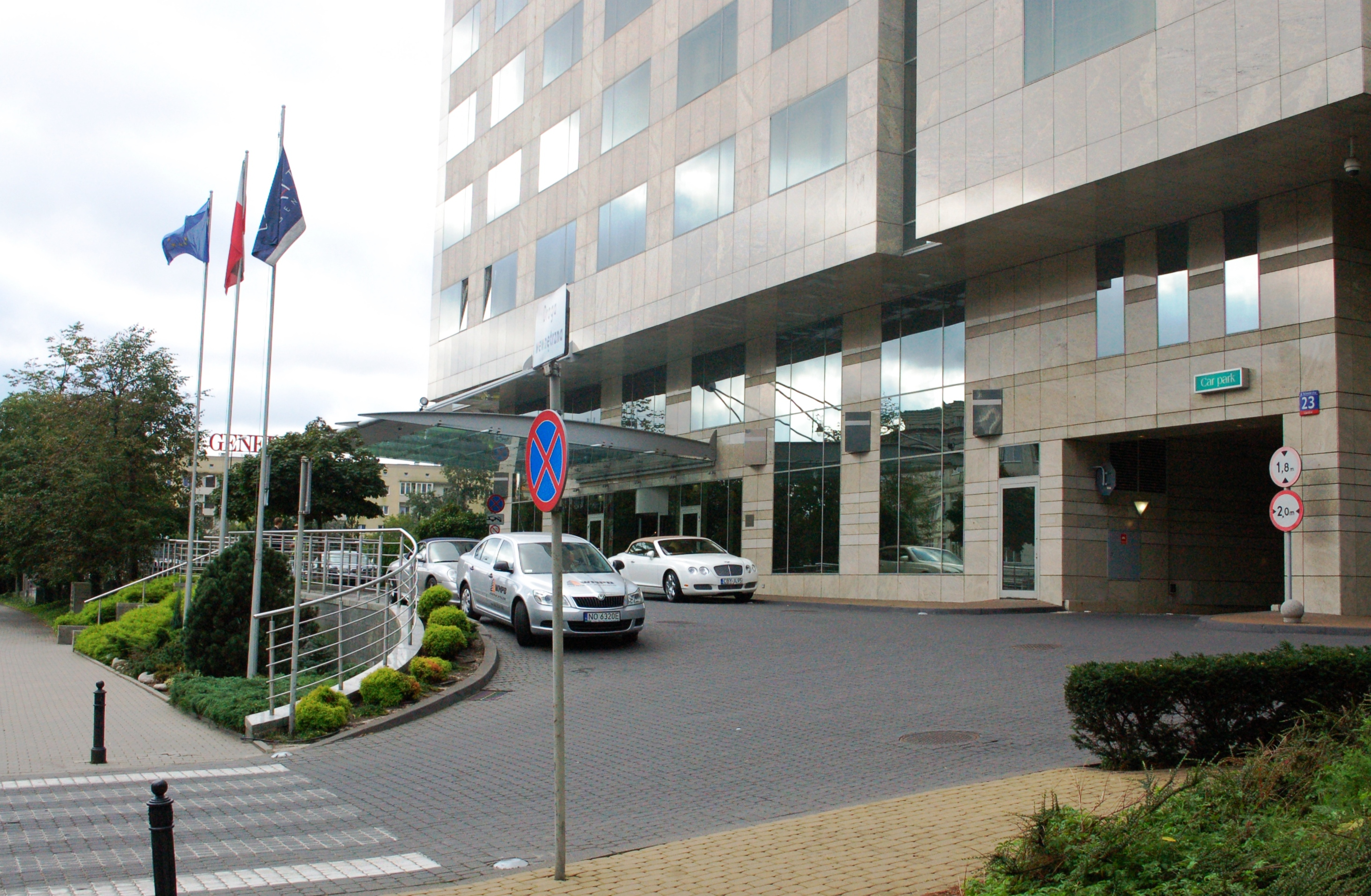 Hyatt-Hotel, Auffahrt, Belwederska, Warschau